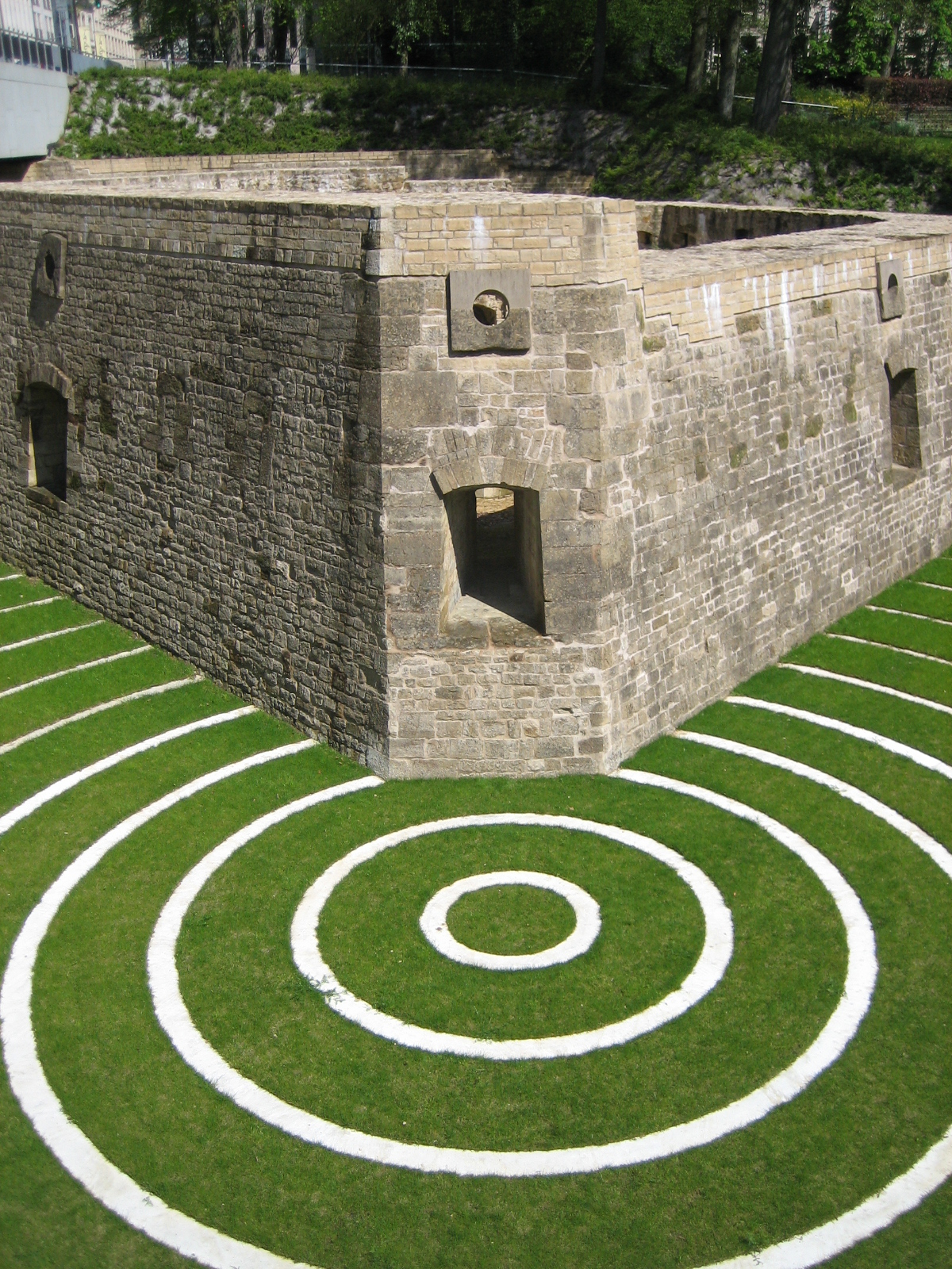 Detail vum Fort Lambert an der Stad Lëtzebuerg, deelweis mat der Installatioun L'onde vum Jean Bernard Métais.